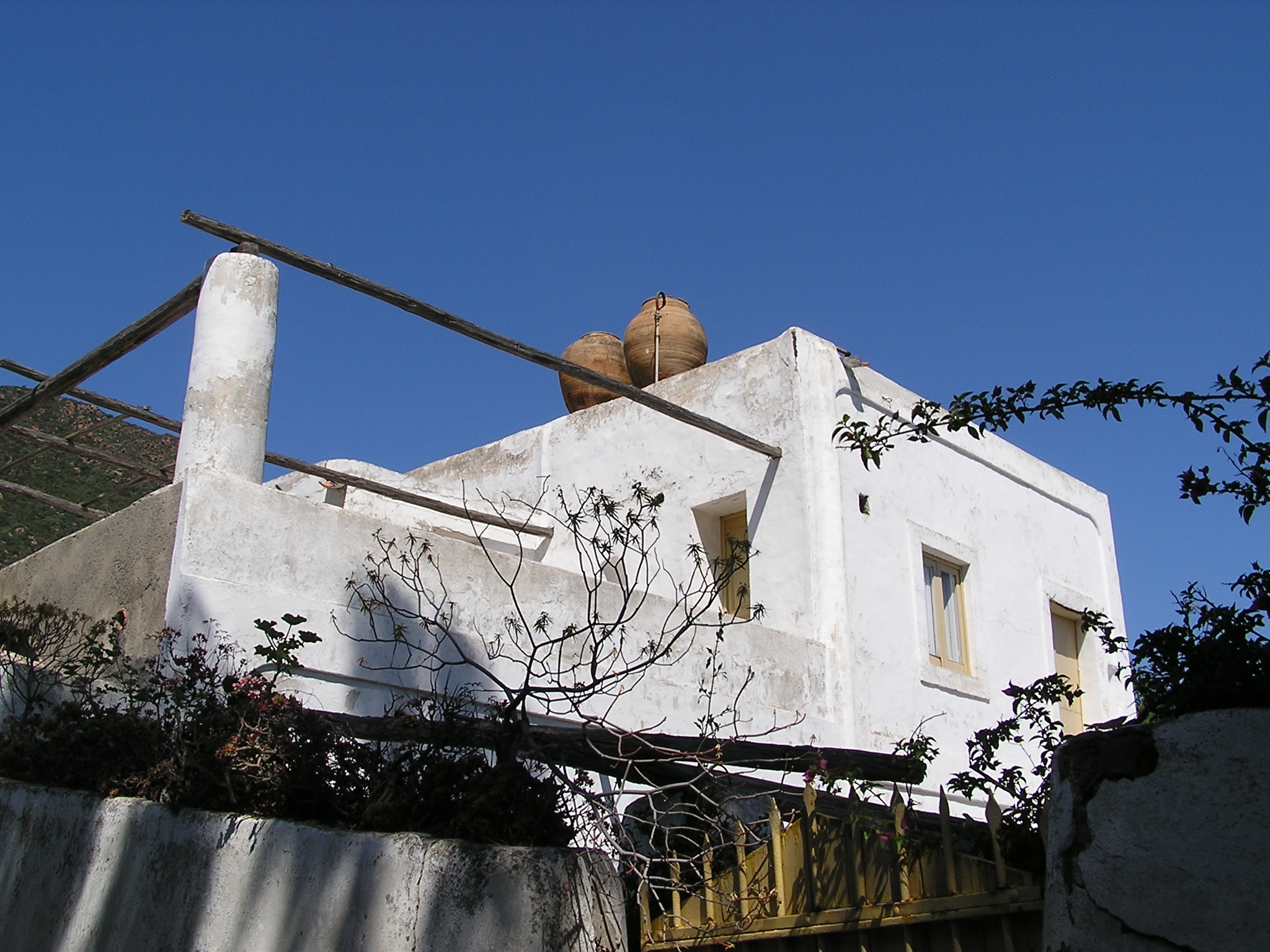 Panarea